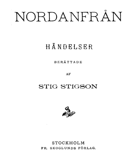 Nordanifrån